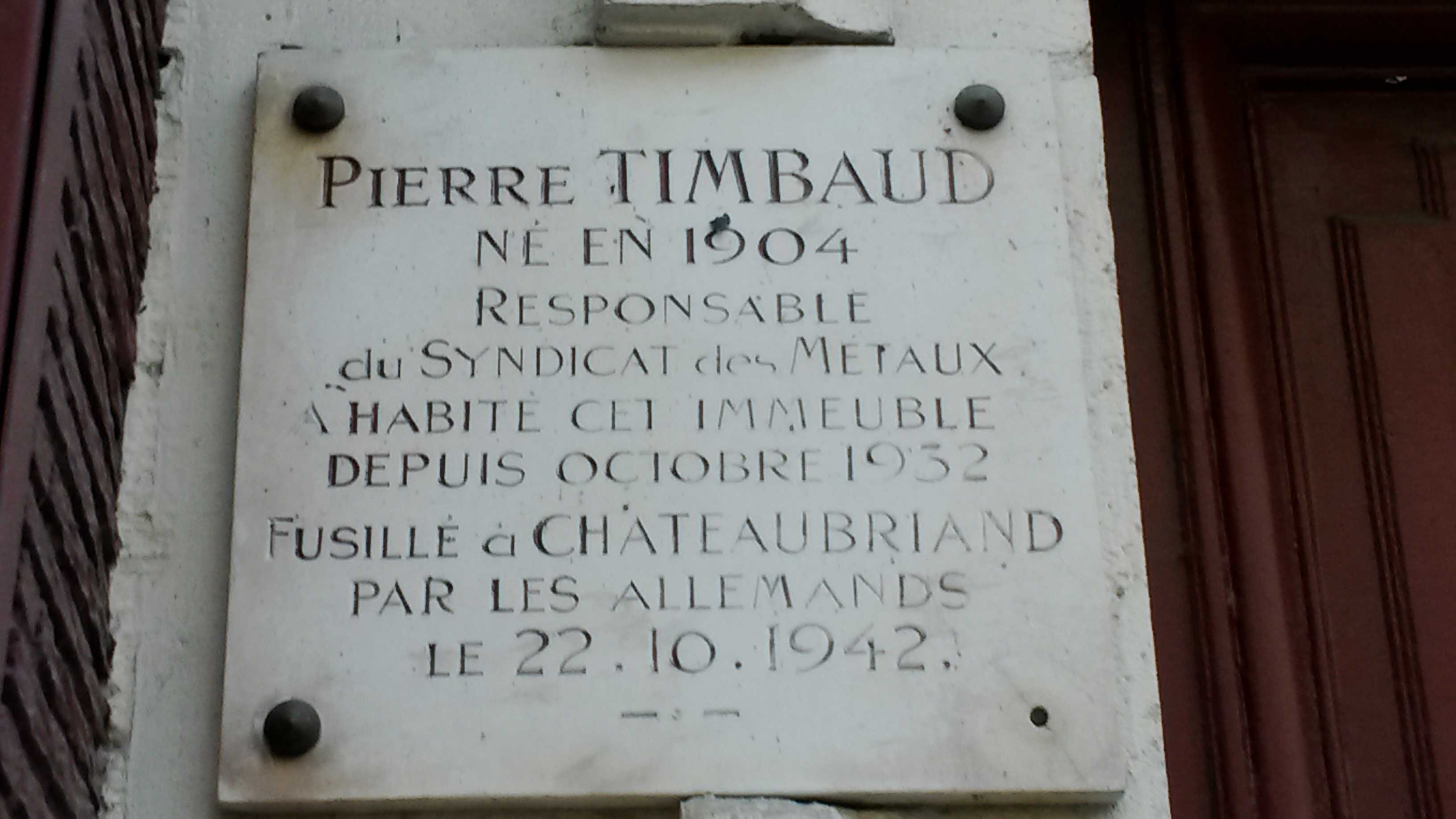 Plaque commémorative apposée sur le 88bis rue Riquet 75018 PARIS, dernier domicile de Jean-Pierre Timbaud.